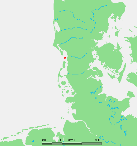 Wadden - Mando.PNG